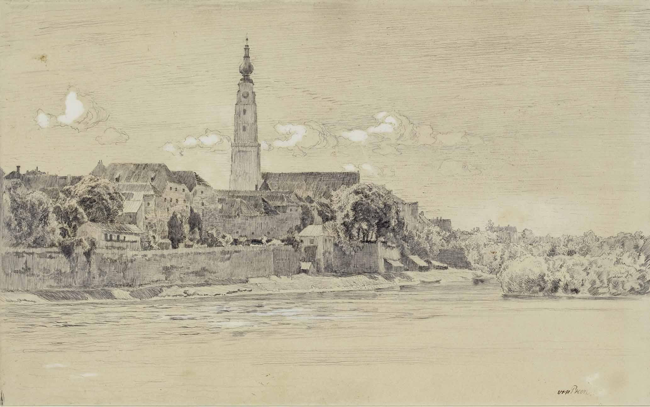 "Die Pfarrkirche von Braunau mit Häusern am Inn" unten rechts signiert: von Preen, Bleistift/Feder, weiß gehöht, auf Papier, 27 x 43 cm